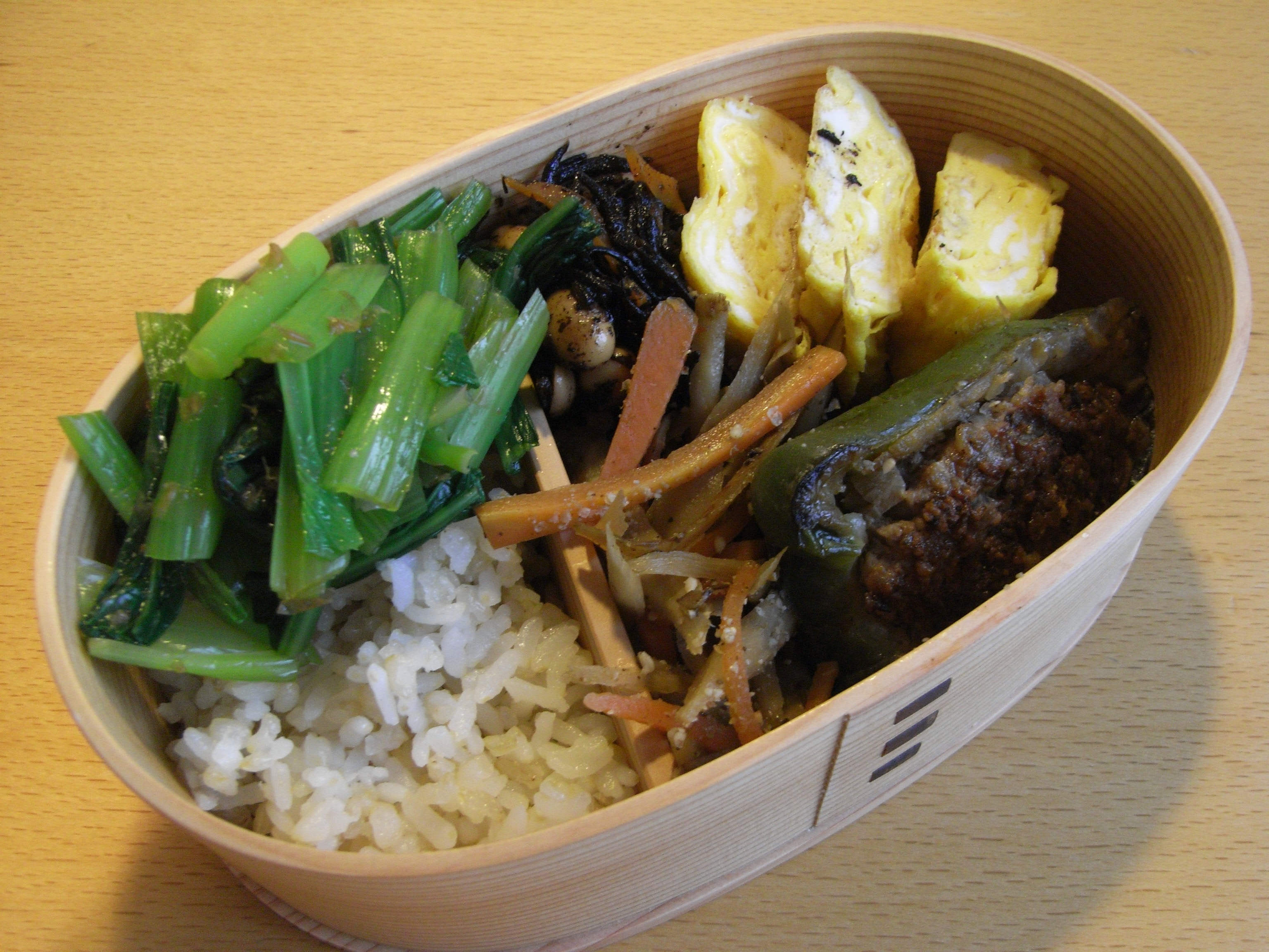 ピーマン肉詰め、卵焼き、小松菜のおひたし